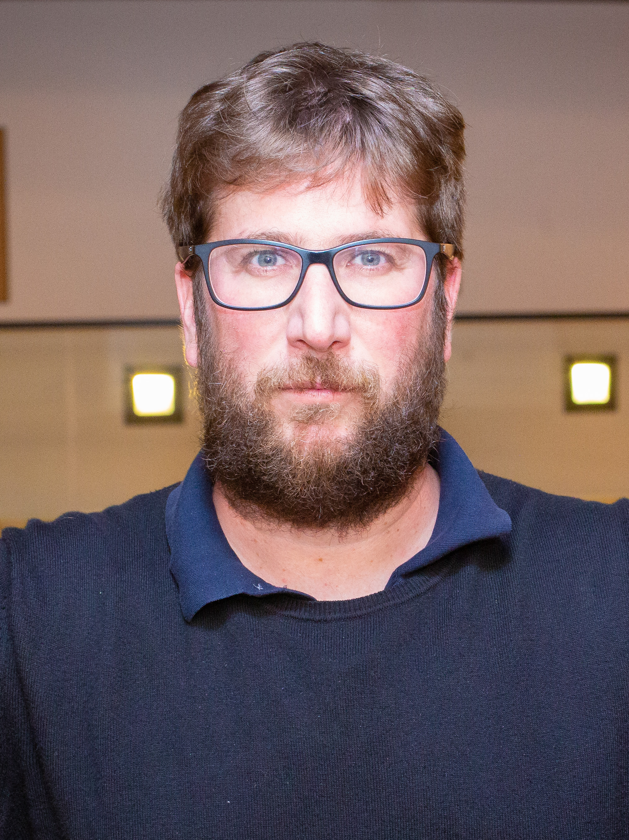 F70A5733-2